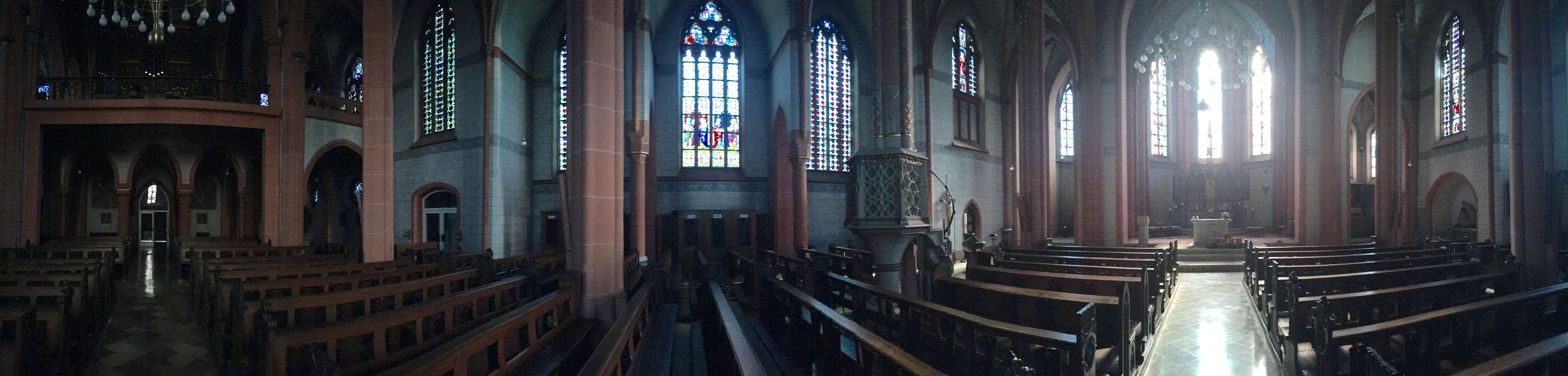 Innenraum Westerwälder Dom